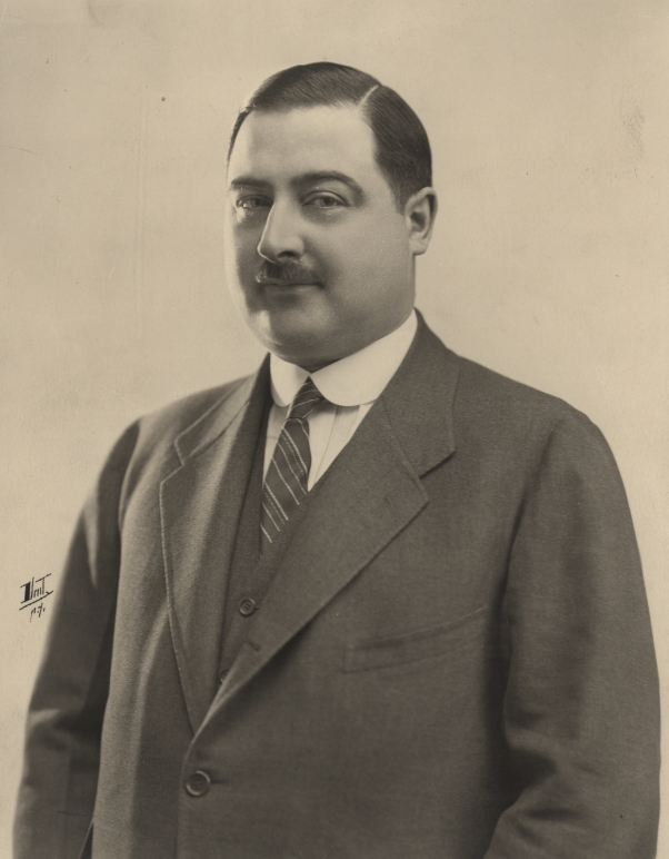 Alexandr "Saša" Josef Kolowrat-Krakowský (1886–1927)